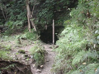 東勝寺旧跡奥 腹切りやぐら 鎌倉市